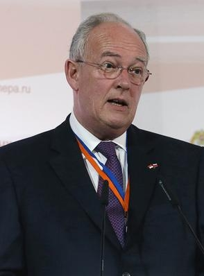 Выступление государственного министра Монако Мишеля Роже на пленарной дискуссии VI Гайдаровского форума